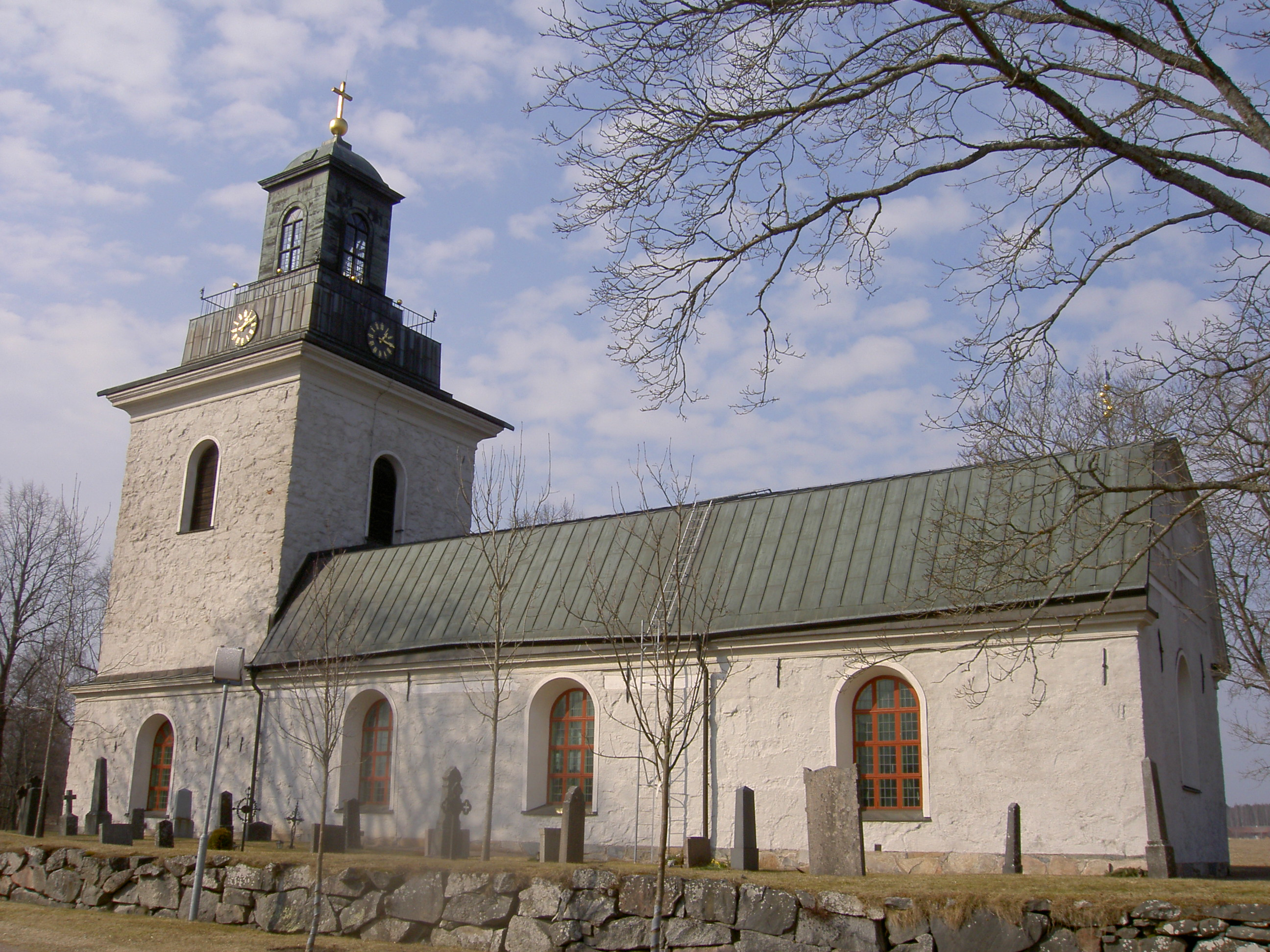 Grytnäs kyrka, Grytnäs, Sverige/Sweden